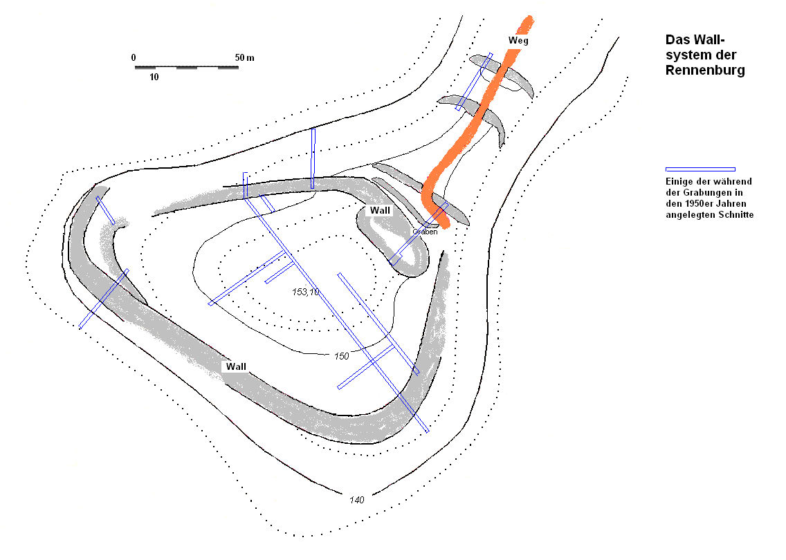 Übersichtsplan des Wallsystems der Rennenburg, einer frühmittelalterlichen Ringwallanlage bei Winterscheid